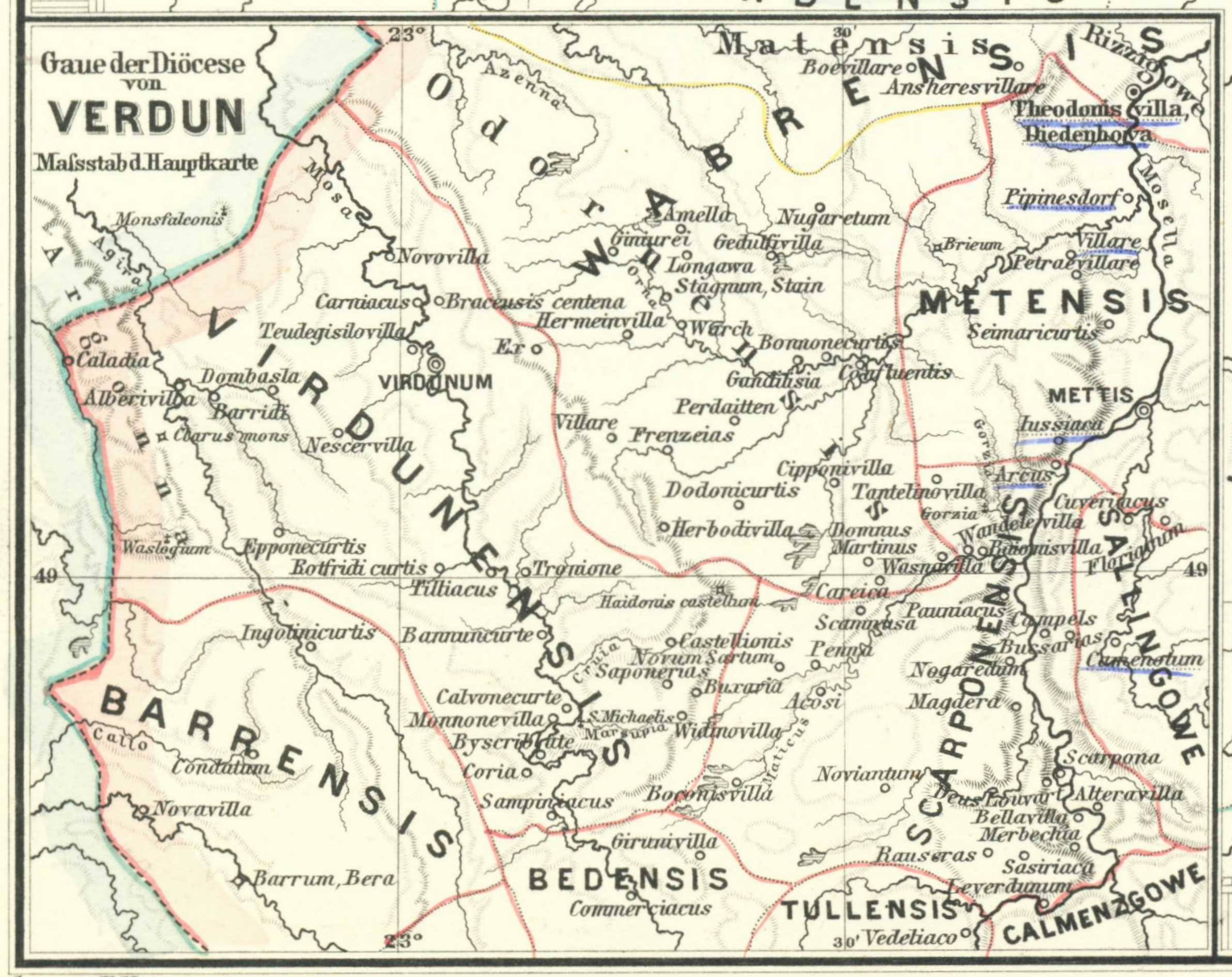 Gaue der Diöcese von Verdun